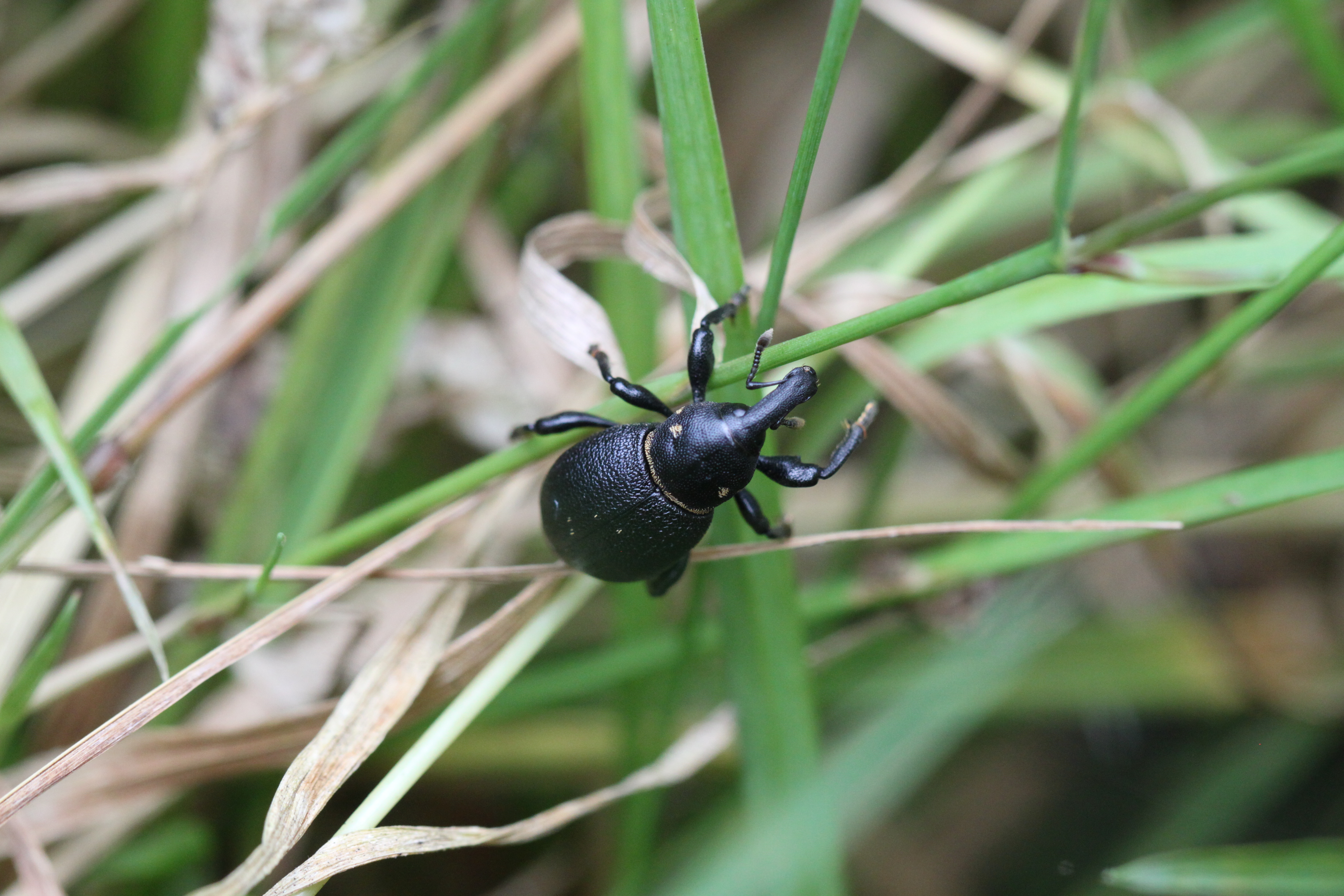 Rüsselkäfer Liparus coronatus im Schwetzinger Hardt